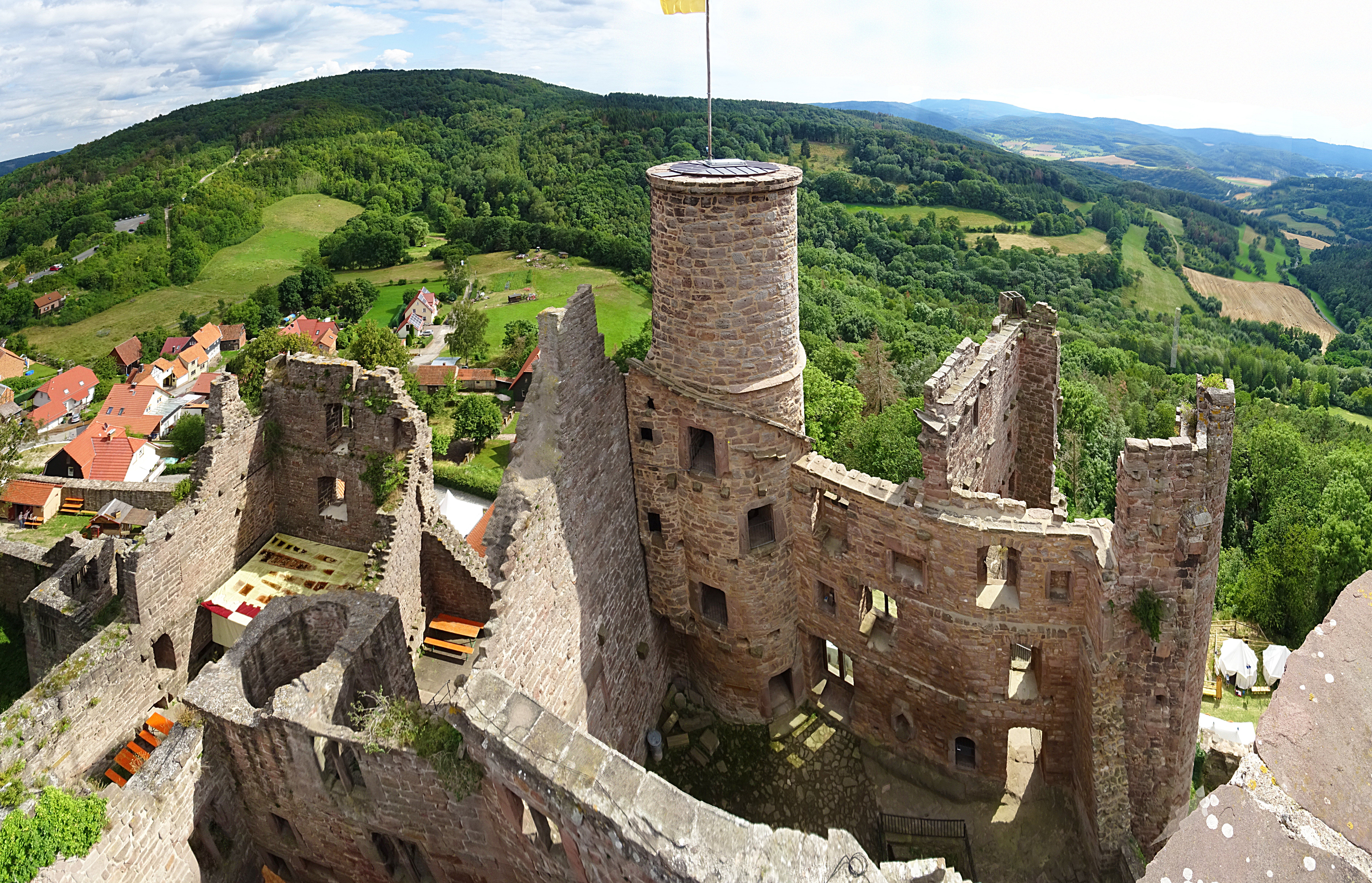 Burgruine Hanstein, Blick vom Nordturm nach Süden